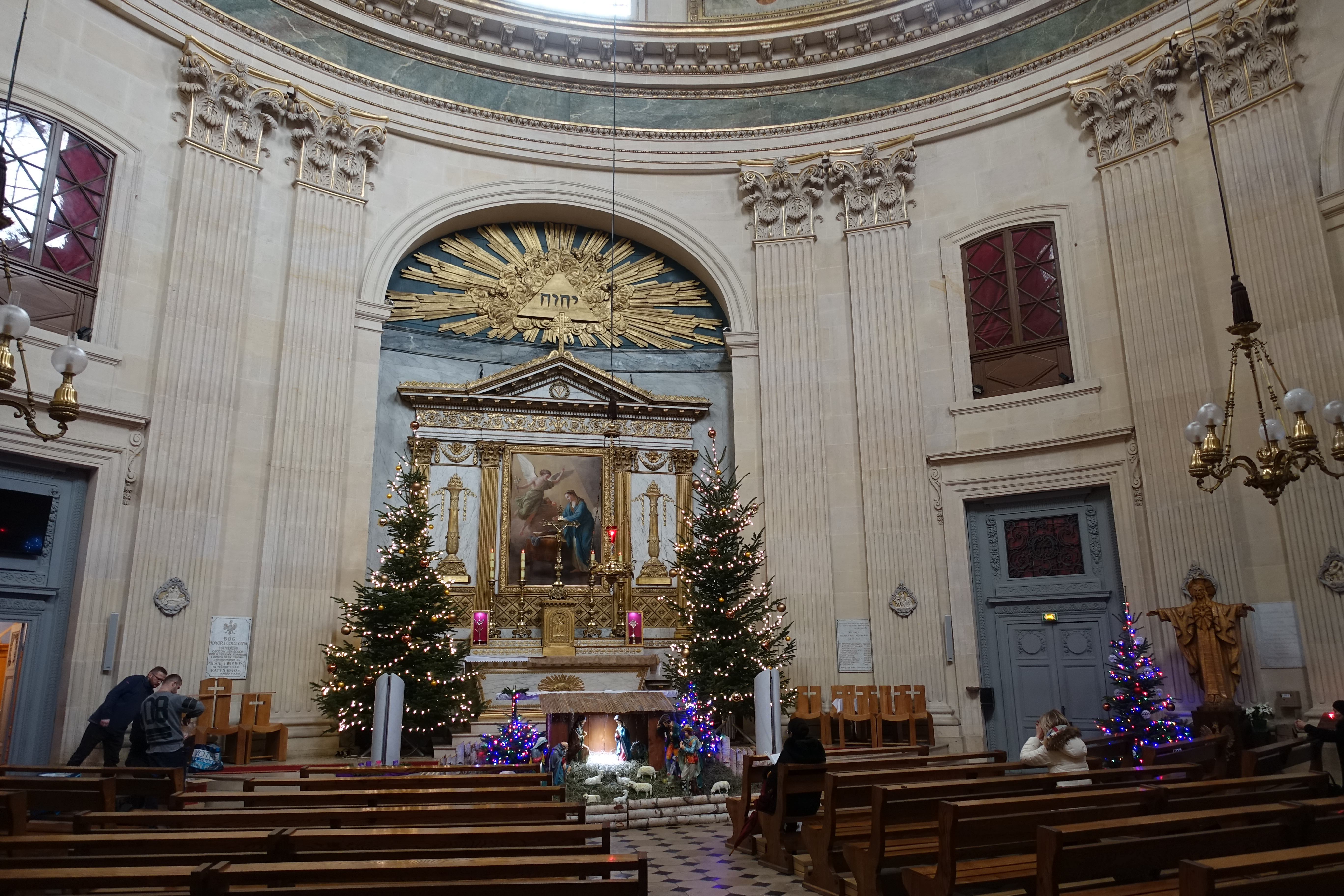 Eglise Notre-Dame de l'Assomption @ Paris Église Notre-Dame-de-l'Assomption, Paris, France.